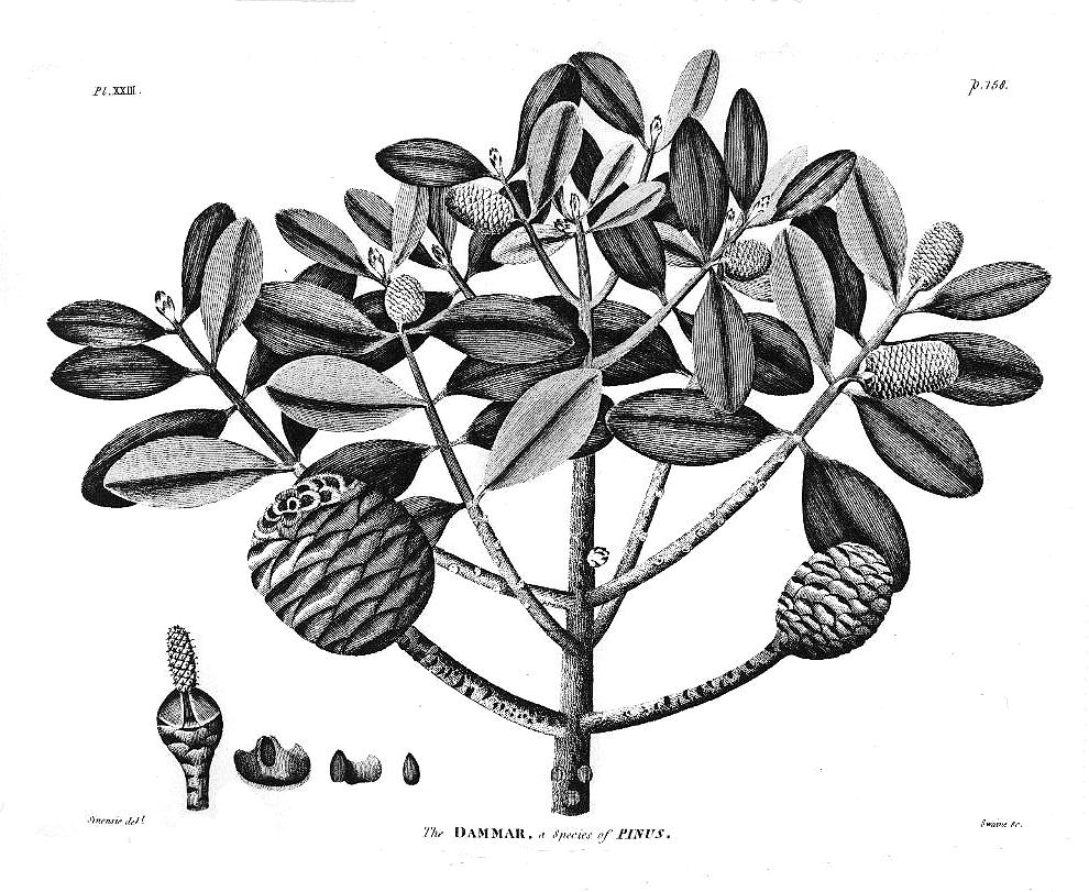 William Marsden: The History of Sumatra. Tafel XXIII: The Dammar